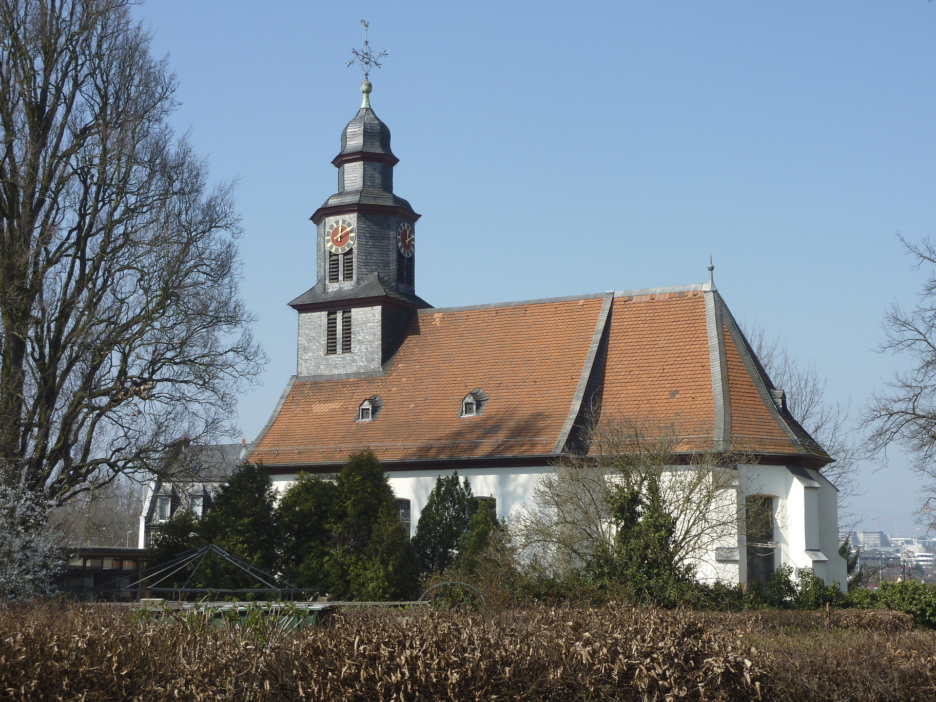 Frankfurt am Main, Stadtteil Eschersheim: Die evangelische Emmauskirche, eine barock erneuerte Saalkirche, wurde die Pfarrkirche des bis 1910 selbständigen Dorfes Eschersheim. Das heutige Kirchengebäude wurde ab 1752 errichtet, am 10. Februar 1754 als reformierte Kirche eingeweiht und ersetzte ein Fachwerkgebäude, das noch aus vorreformatorischer Zeit stammte und ursprünglich Petrus geweiht war. Mit der Hanauer Union in der ehemaligen Grafschaft Hanau-Münzenberg, zu der Eschersheim damals gehörte, wurde die Kirche uniert. Ein besonderes Merkmal der reformierten Kirchen ist die Betonung der Gleichgewichtigkeit des Alten und des Neuen Testamentes. Aus dem Alten Testament erklärt sich auch die Hervorhebung des Bilderverbotes, was sich in der relativen Nüchternheit reformierter Kirchengebäude wiederfindet. Kruzifixe oder größere Ausschmückungen werden in der Regel abgelehnt. Die reformierte Liturgie ist ebenfalls relativ schlicht und auf die Predigt bzw. Verkündigung des Wortes Gottes zugeschnitten. Entsprechend ist die Kanzel in den meisten reformierten Kirchengebäuden zentral angebracht. Kennzeichnend sind auch die schlicht gehaltenen sogenannten Genfer Psalter. Wechselgesänge gibt es in der Regel nicht. Das Foto zeigt eine Totale der Kirche, Ansicht von Osten